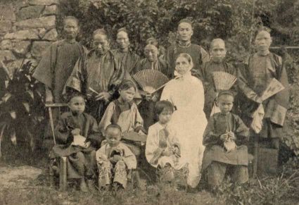 Schwester Martha Postler in der Honkonger Blindenmission